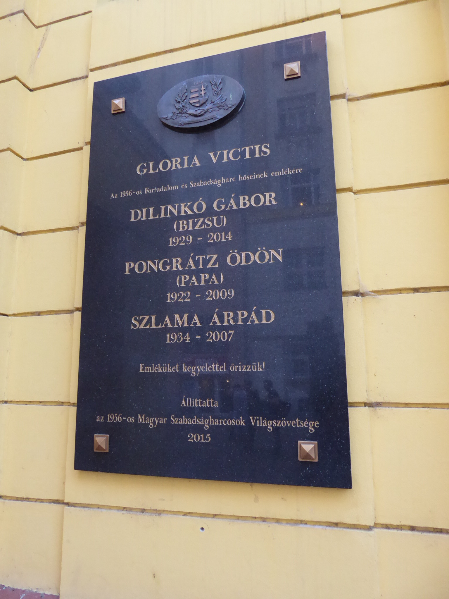 Dilinkó Gábor forradalom és szabadságharc emléktábla a Corvin mozi falán, Budapest VIII. Felirata: Gloria victis Az 1956-os Forradalom és Szabadságharc hőseinek emlékére Dilinkó Gábor (Bizsu) 1929–2014 Pongrátz Ödön (Papa) 1922–2009 Szlama Árpád 1934–2007 Emléküket kegyelettel őrizzük! Állíttatta az 1956-os Magyar Szabadságharcosok Világszövetsége, 2015. A táblán fent a dombormű az 1956-os Magyar Szabadságharcosok Világszövetsége logóját ábrázolja. A fényképet 2017-05-26-n készítettem.